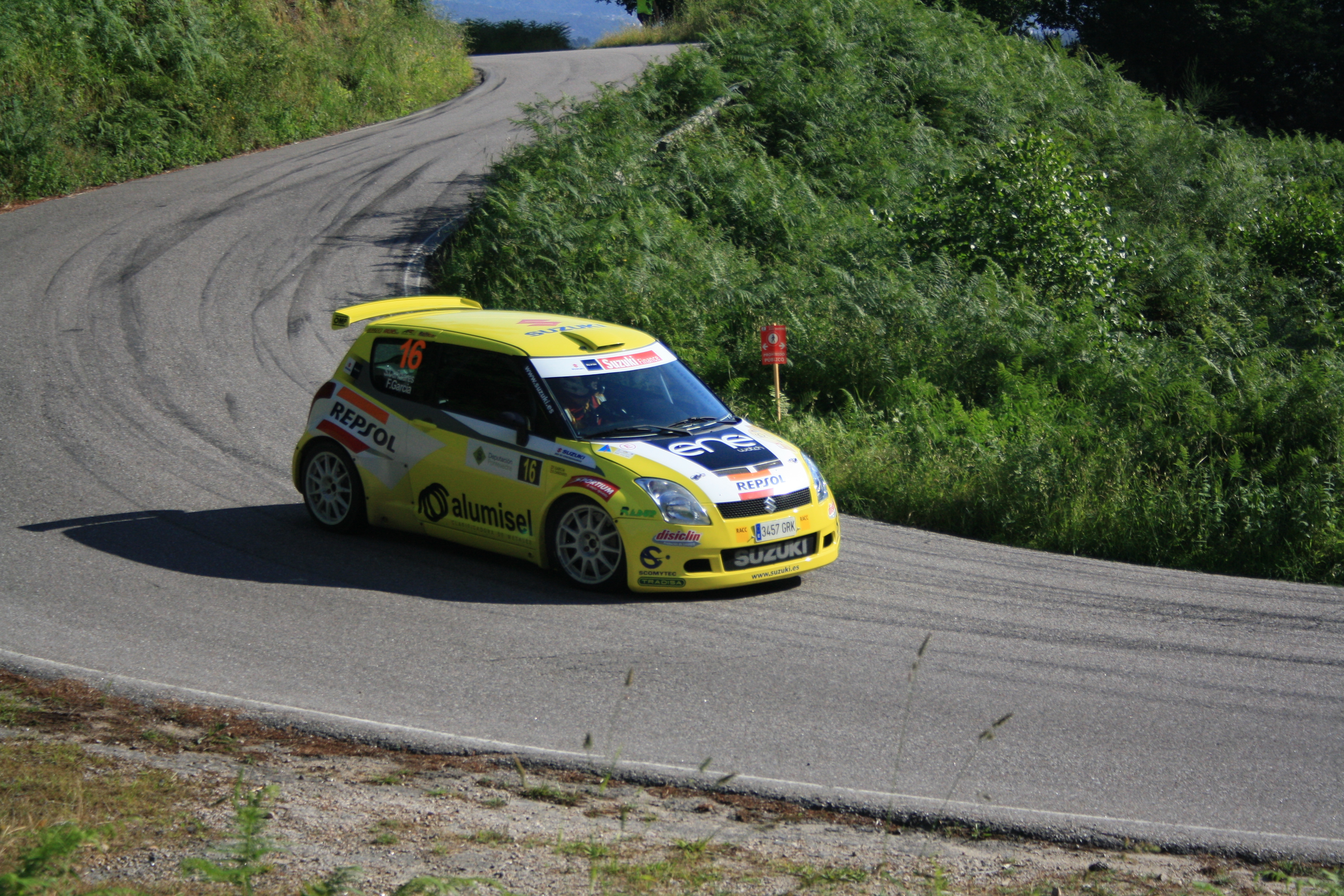 En el tramo de Alba-Nigrán